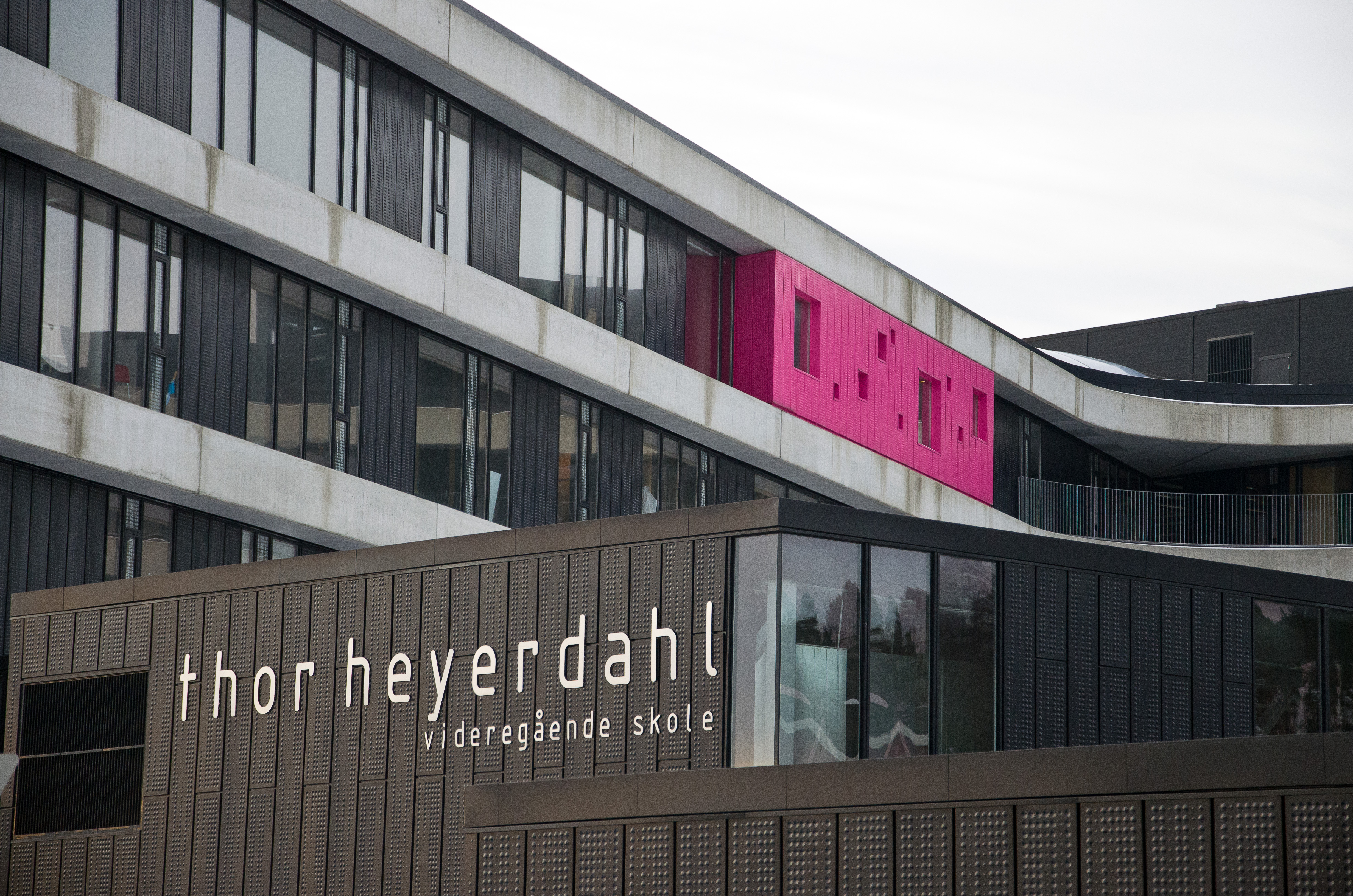 Thor Heyerdal Videregående skole